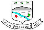 Brasão do município de Ouro Branco, estado do Rio Grande do Norte, Brasil.